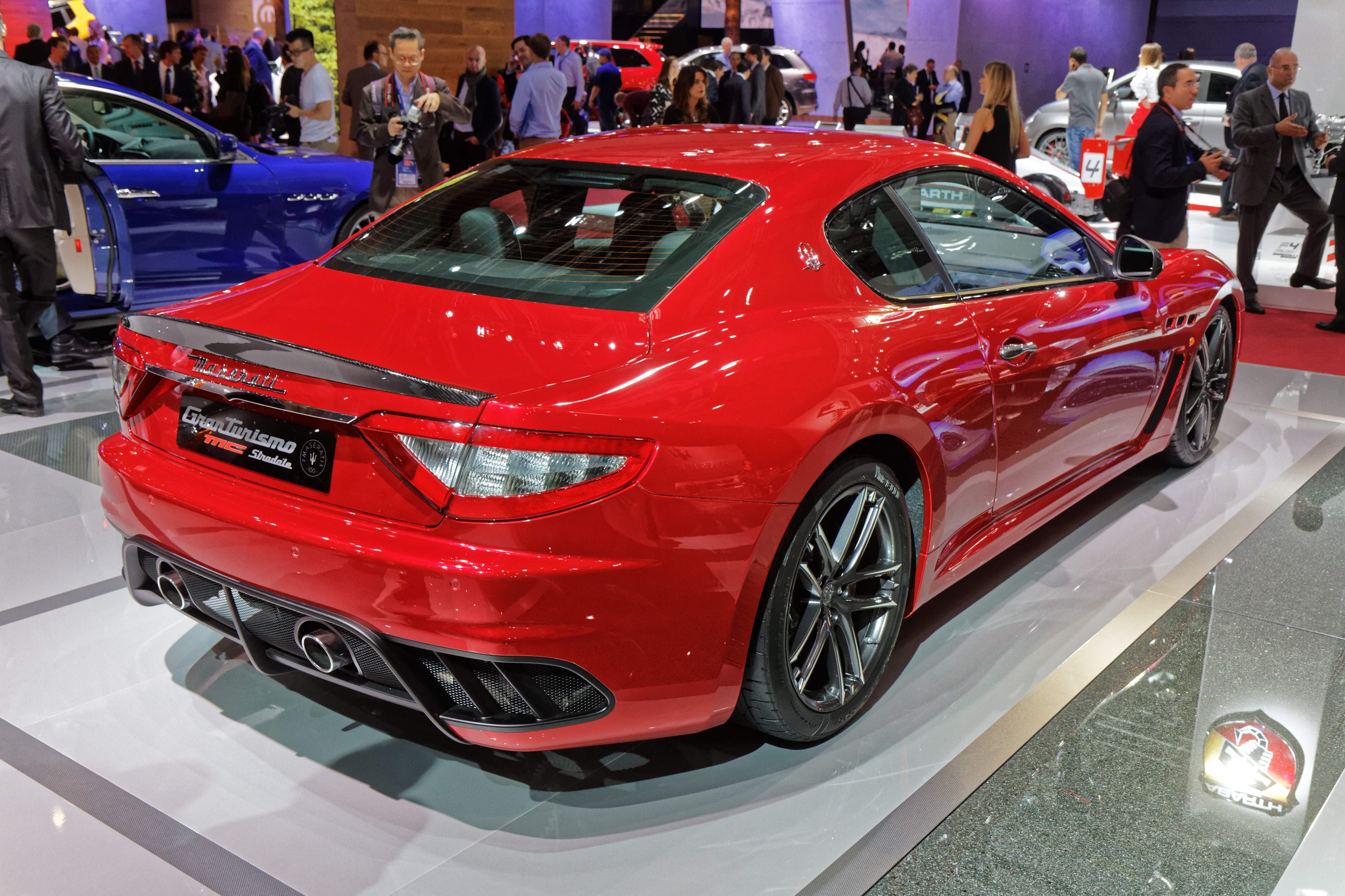 Une Maserati GranTurismo MC Stradale présentée lors du mondial de l'automobile de Paris 2014.